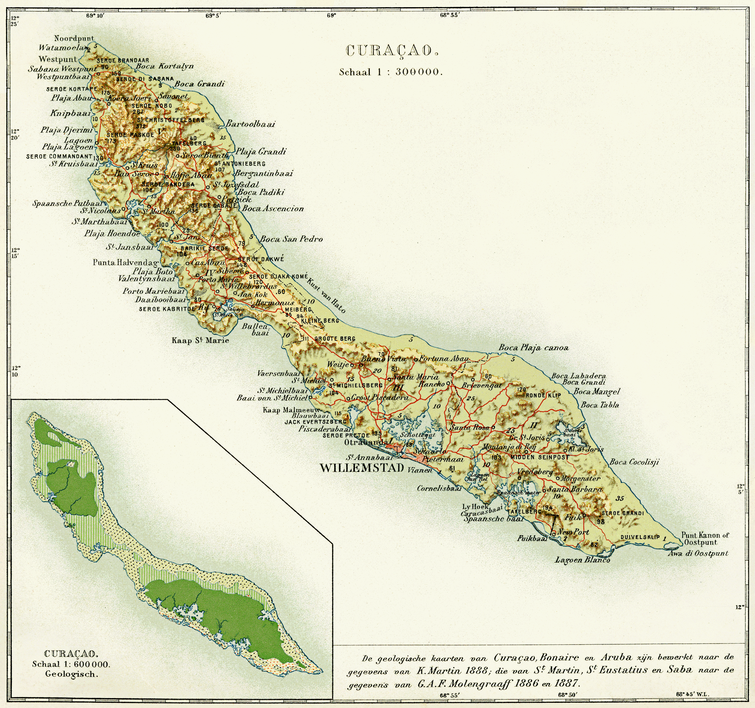 Curaçao - Karte aus der Enzyklopädie der Niederländischen Antillen.